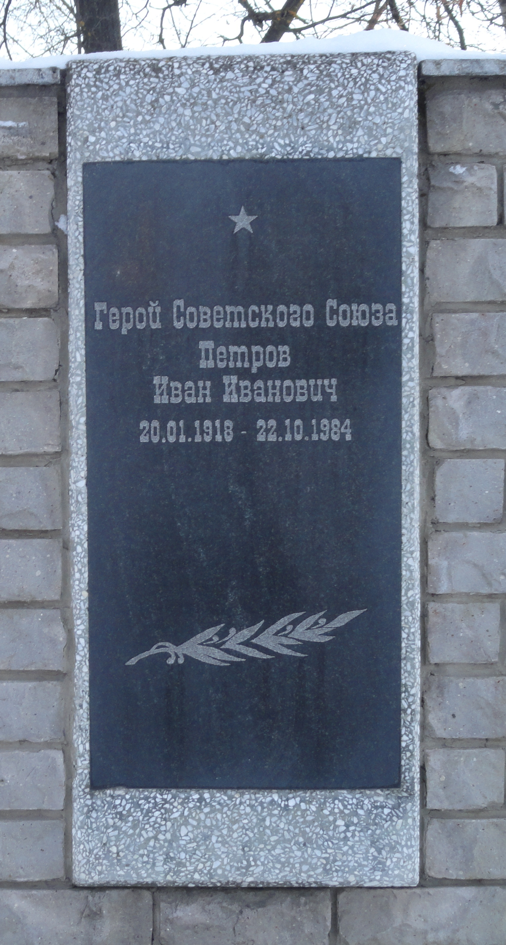 Памятная доска Петрову Ивану Ивановичу установлена в г. Кулебаки Нижегородской области на Стене Героев на мемориальном комплексе площади Победы.